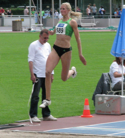 Bianca Kappler beim DLV WM-Testwettkampf 2011 im Stadion der MTG Mannheim.